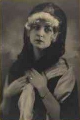 Alexandra Čvanová operní zpěvačka